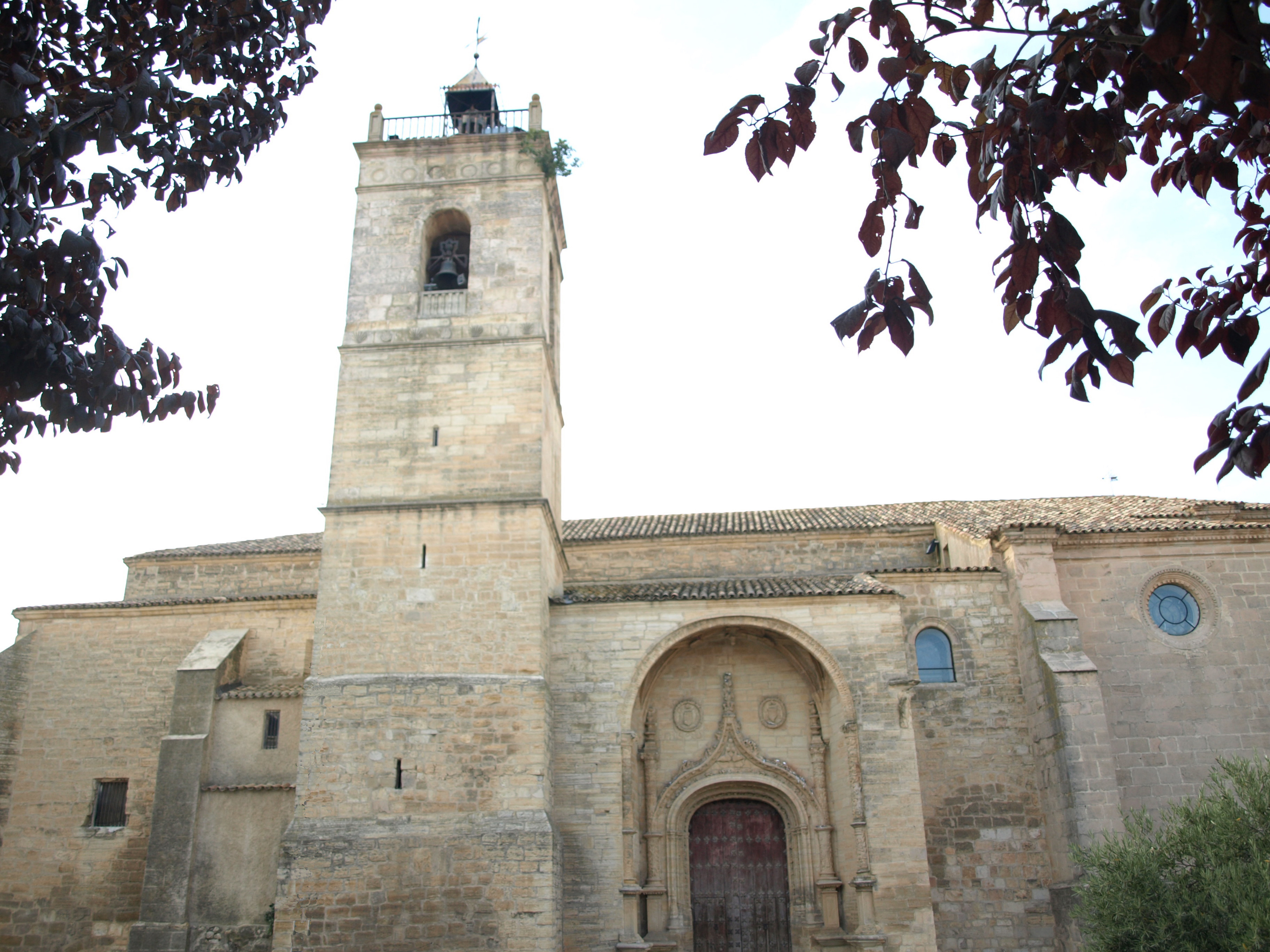 Fachada principal de la Iglesia de la Natividad de Nuestra Señora, en Carrascosa del Campo